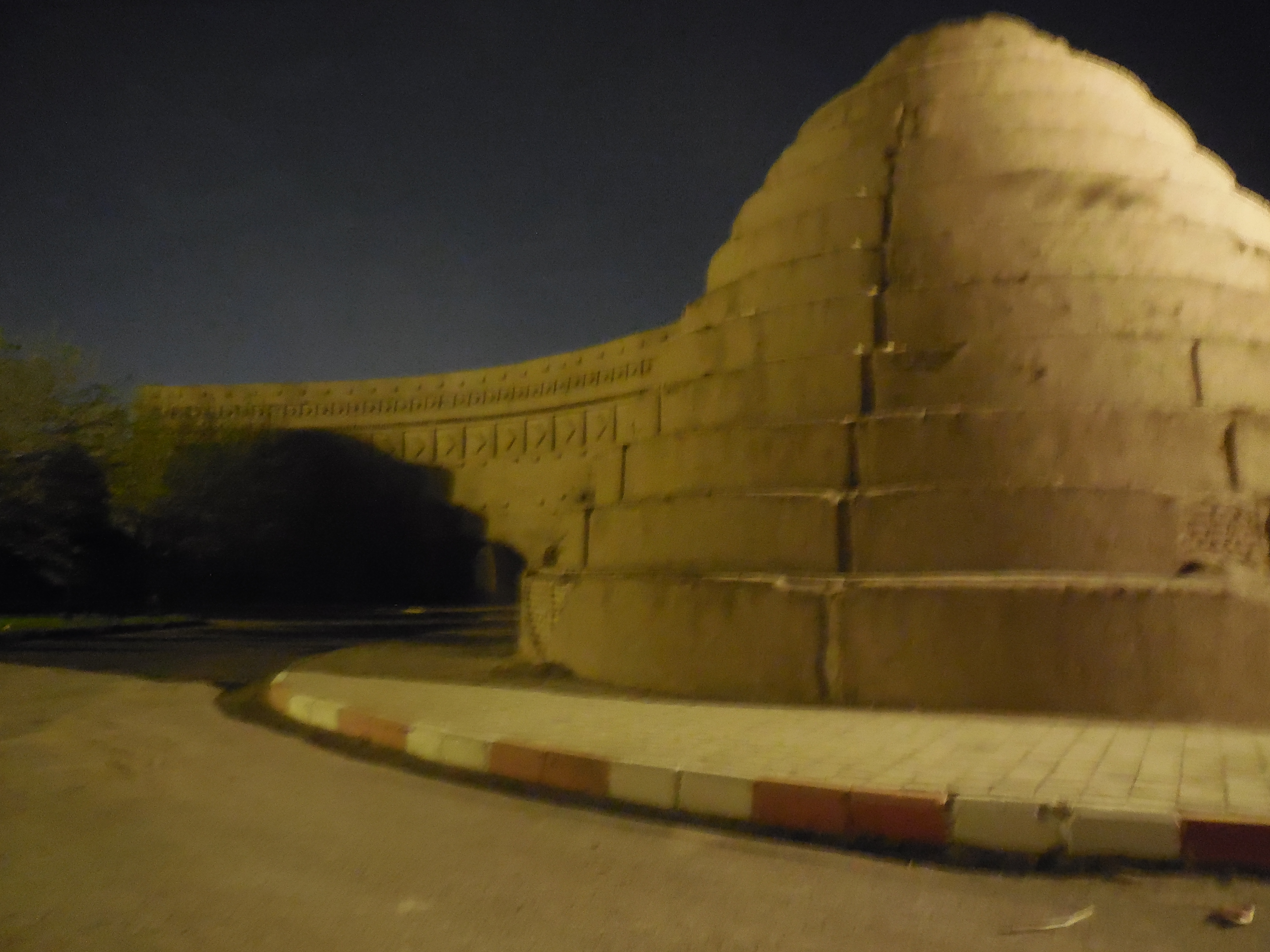 alter Eiskeller